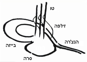 Tugra decomposed